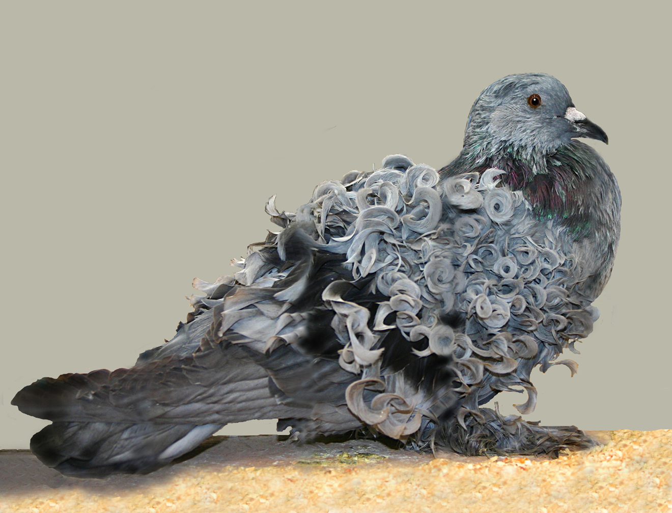 Blue bar grizzle Frillback pigeon.